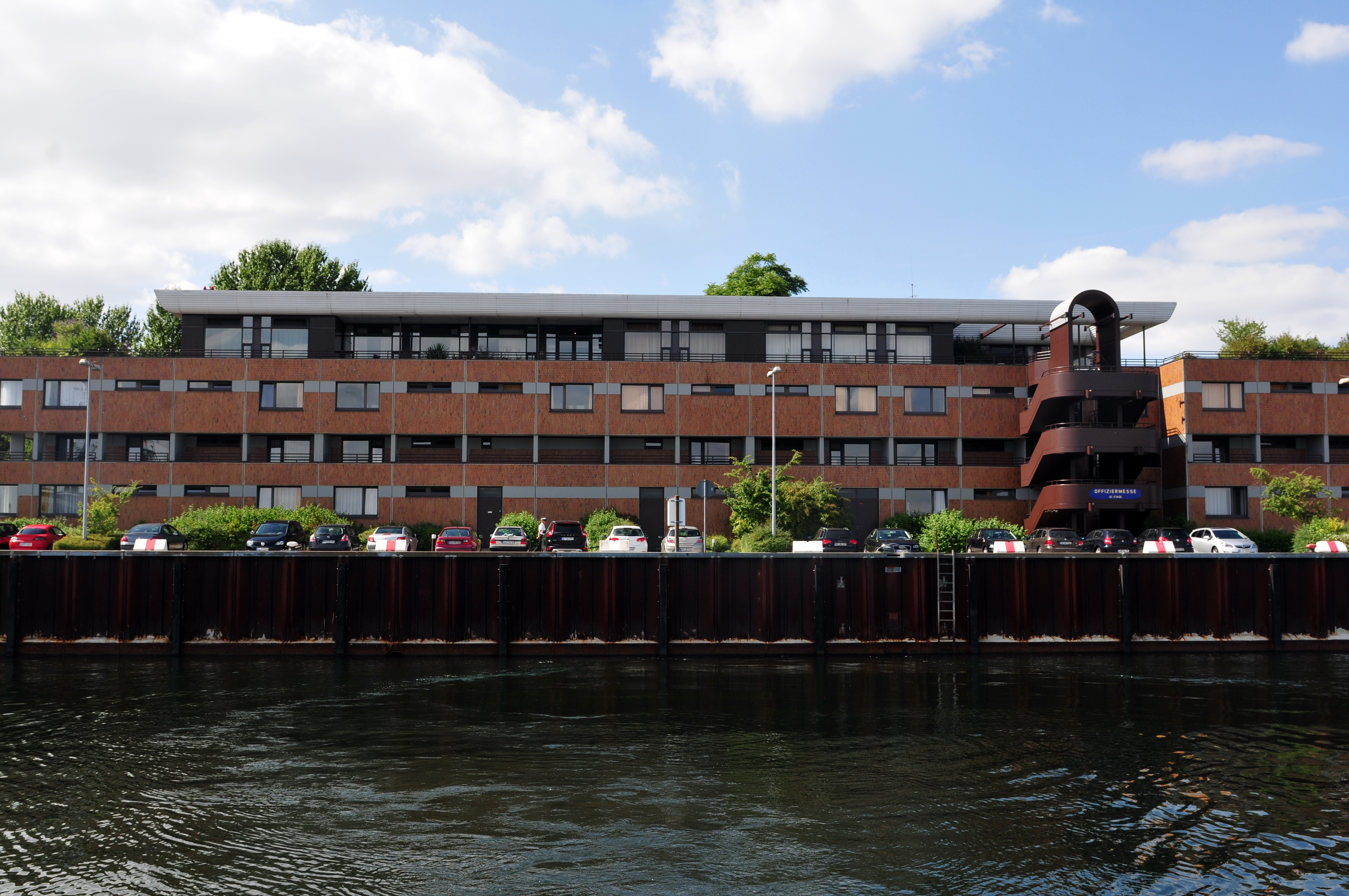 Landtagsprojekt Schleswig-Holstein; Marinestützpunktkommando Kiel